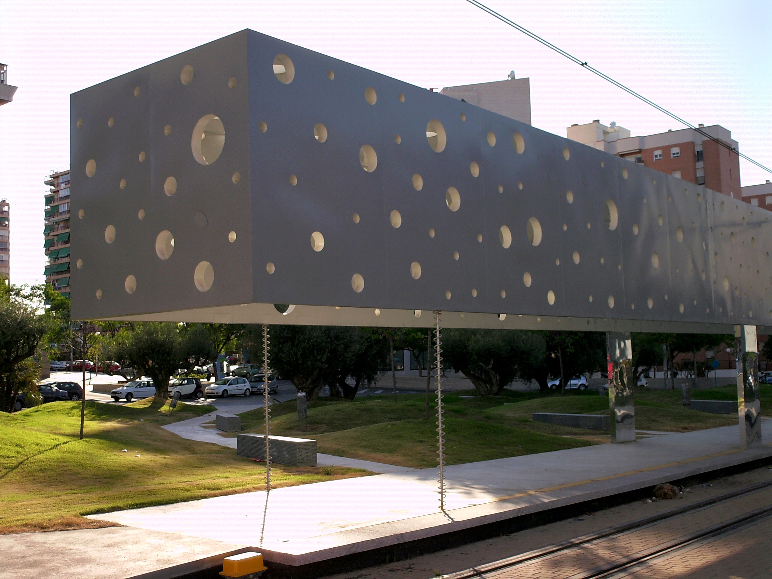 Wegen ihrer speziellen künstlerischen Gestaltung umstrittene Stadtbahnstation "Sergio Cardell" der Linie L4 in Alicante / Estación "Sergio Cardell" de la línea L4 del TRAM Metropolità d'Alacant